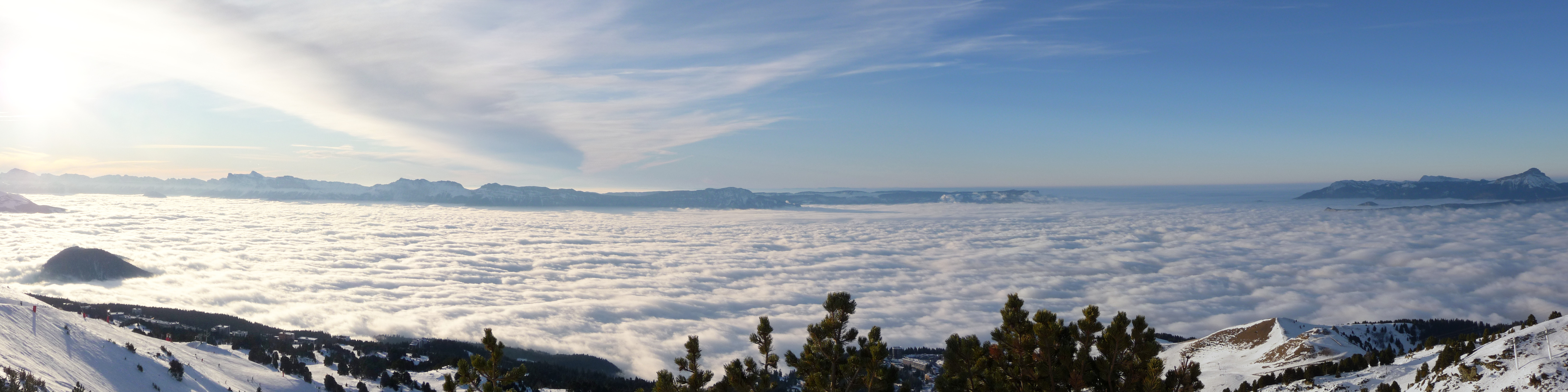 Vu sur Grenoble (recouvert par les nuages) depuis Chamrousse